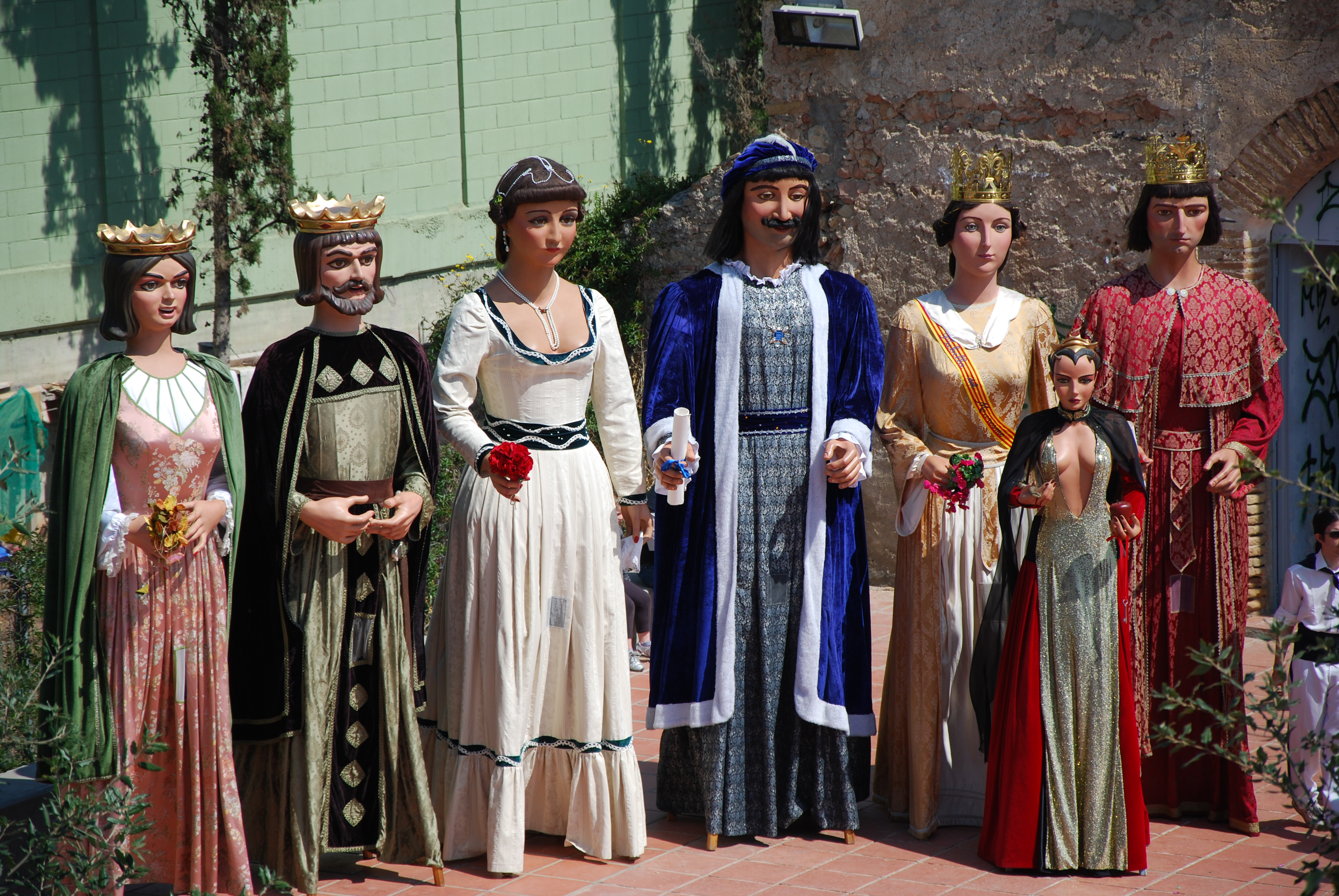 De dreta a esquerra: n'Elionor de Santcliment, en Ferrer de Gualbes, na Maria, l'Anastasi, na Badamar, la Dimonieta i en Jeroni